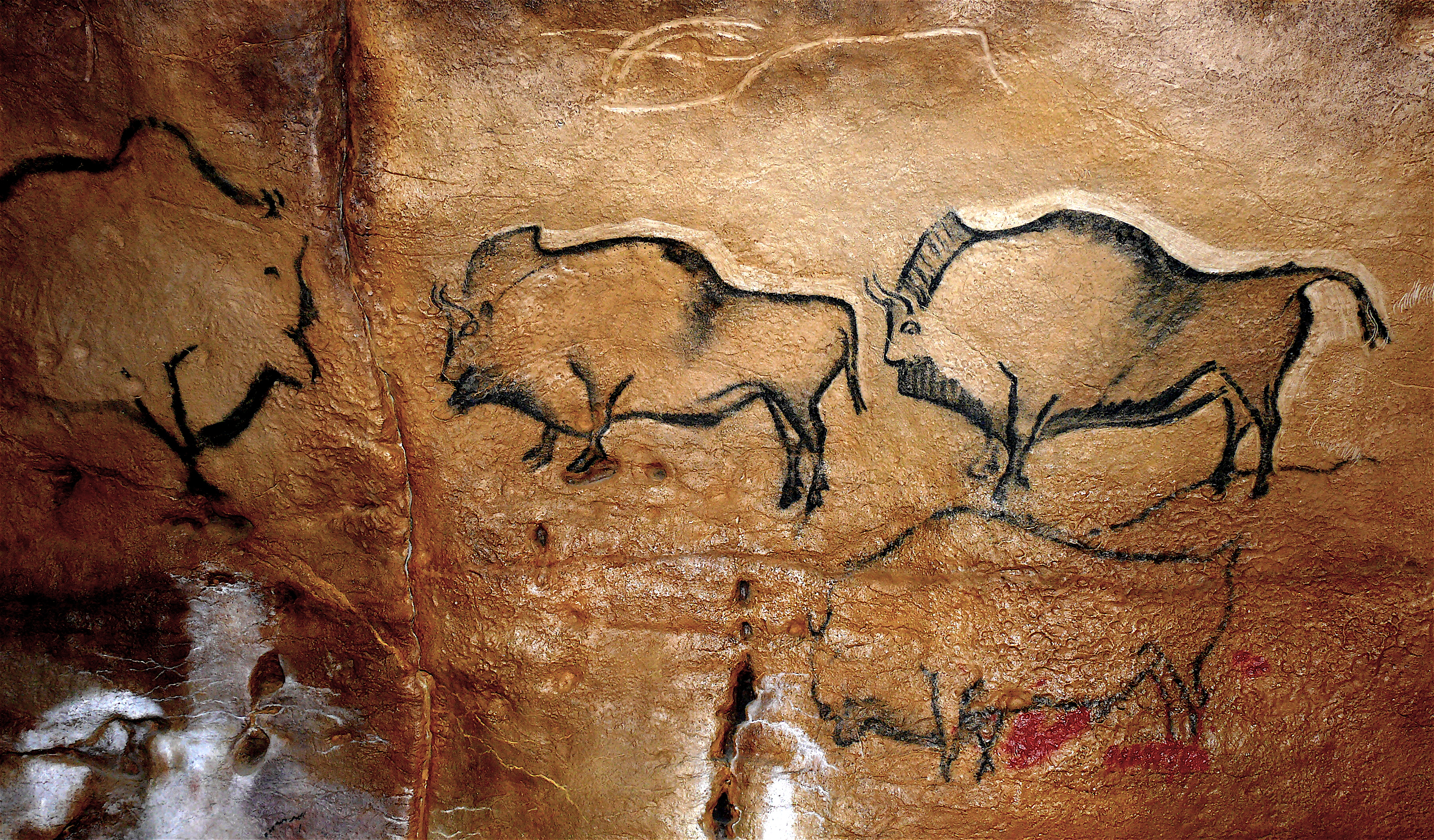 Panel rupestre pintado con figuras de bisontes en la gruta de La Covaciella, yacimiento arqueológico situado en el concejo asturiano de Cabrales, en la zona de Las Estazadas, España. Réplica por Matilde Múzquiz y Pedro Saura.